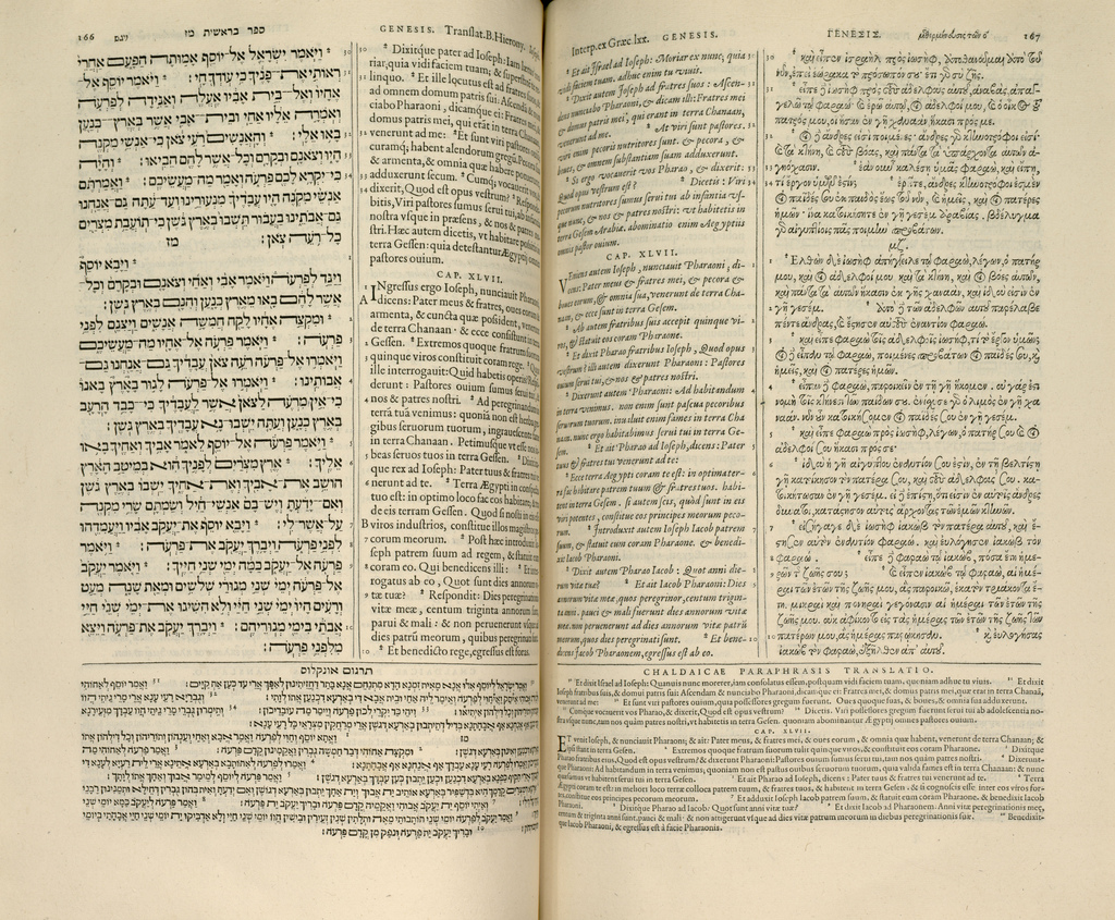 Страница Книги Бытия в Антверпенской Полиглотте